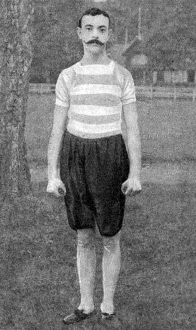 Fernand Meiers vers 1890.